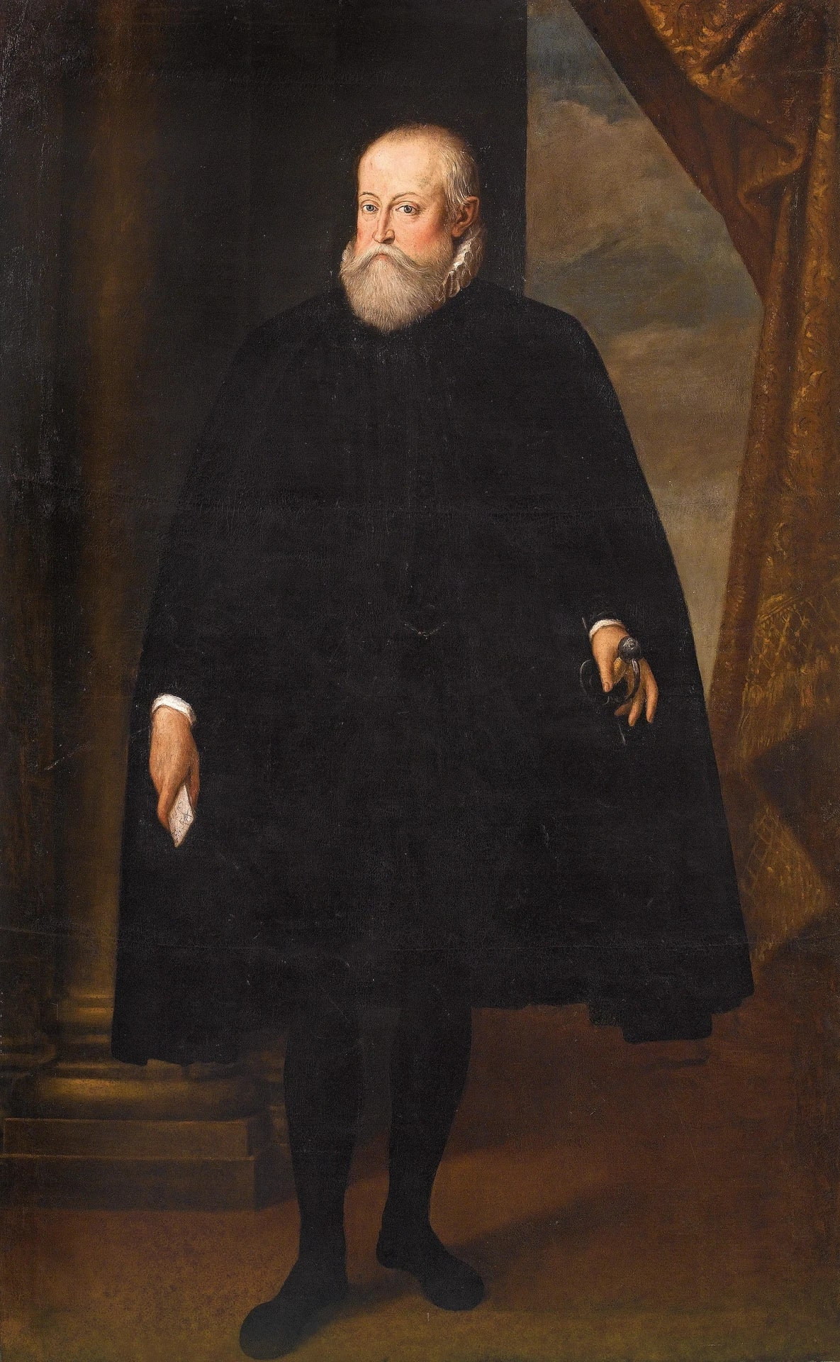 Retrato de Alfonso II de Este (1533-1597), duque de Ferrara